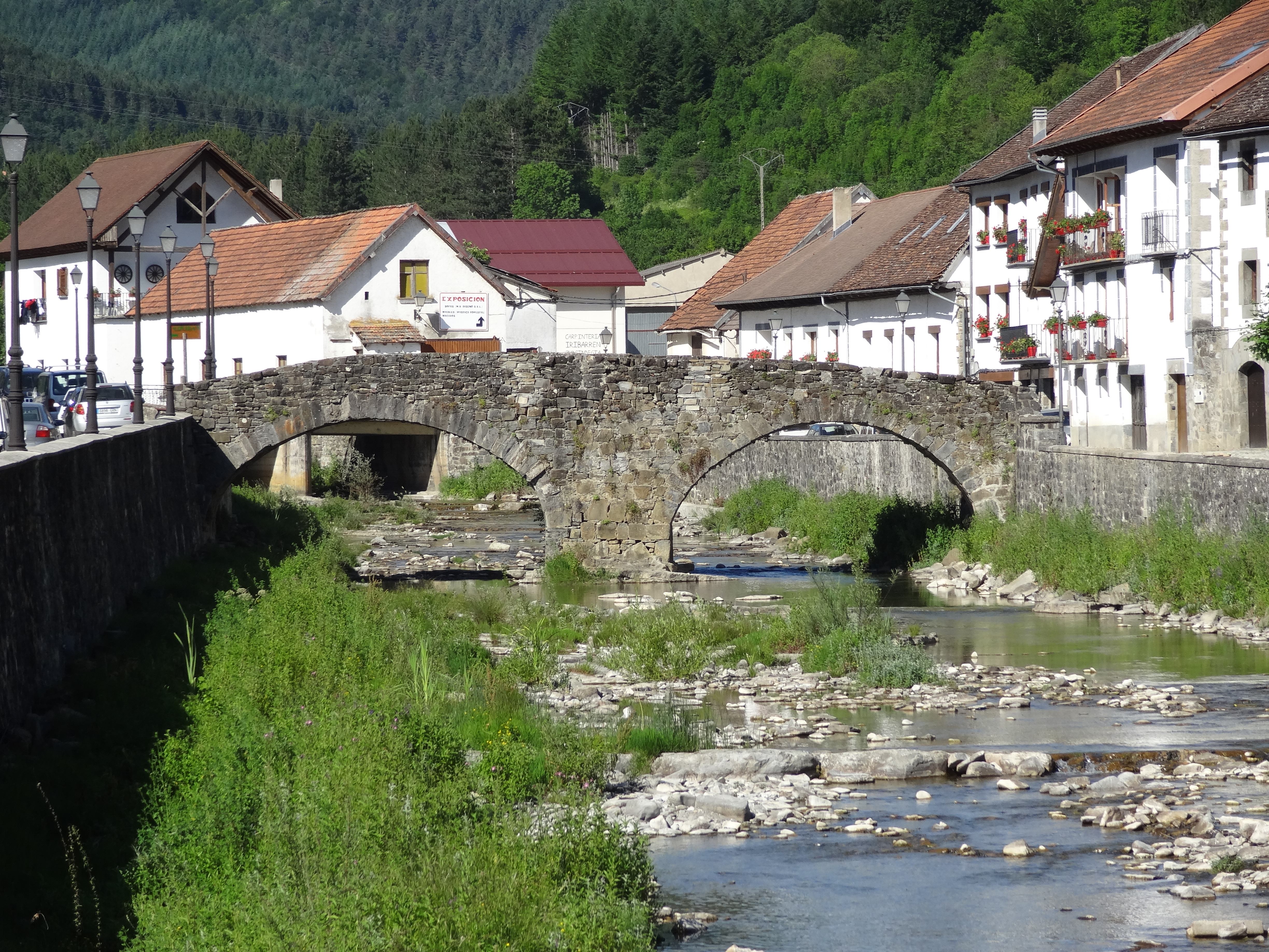 Ochagavía-Otsagabia